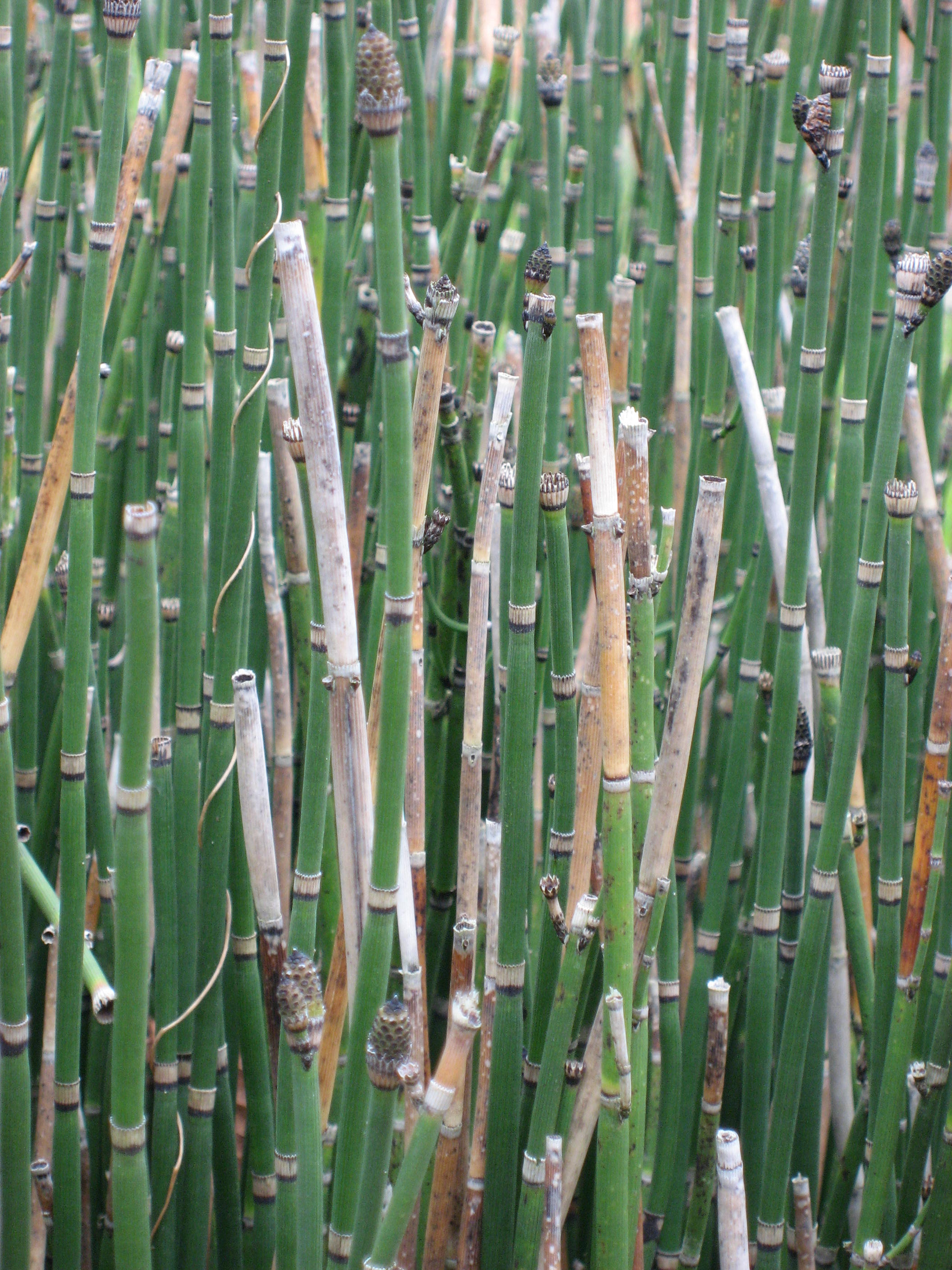 Equisetum hyemale in Conservatoire National des Plantes à Parfum Map: 48° 23' 49" N 2° 28' 45" E